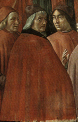 detail Cristoforo Landino (center) and Angolo Poliziano (right)